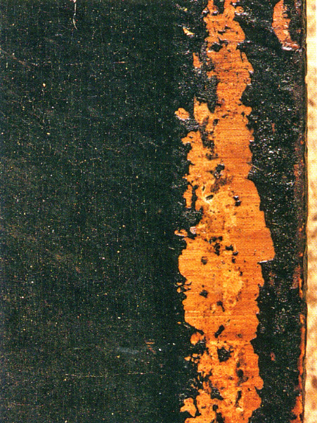 Unter der beschädigten Farbschicht ist die ockerfarbene Imprimitur zu erkennen.